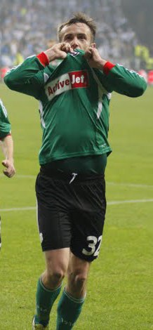 18.11.2012 204.jpg